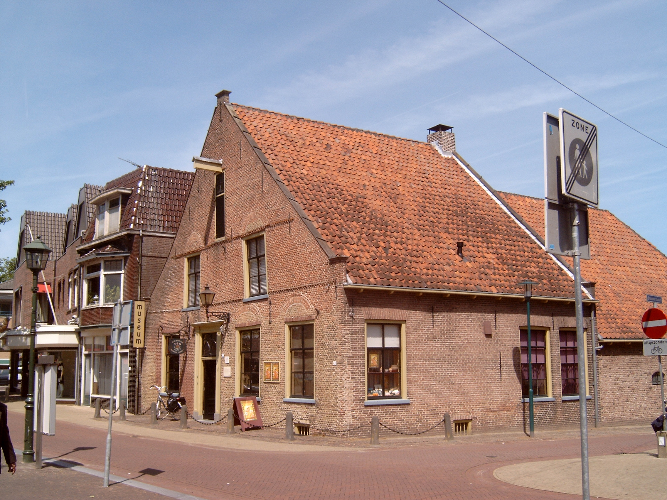 Barneveld, museum